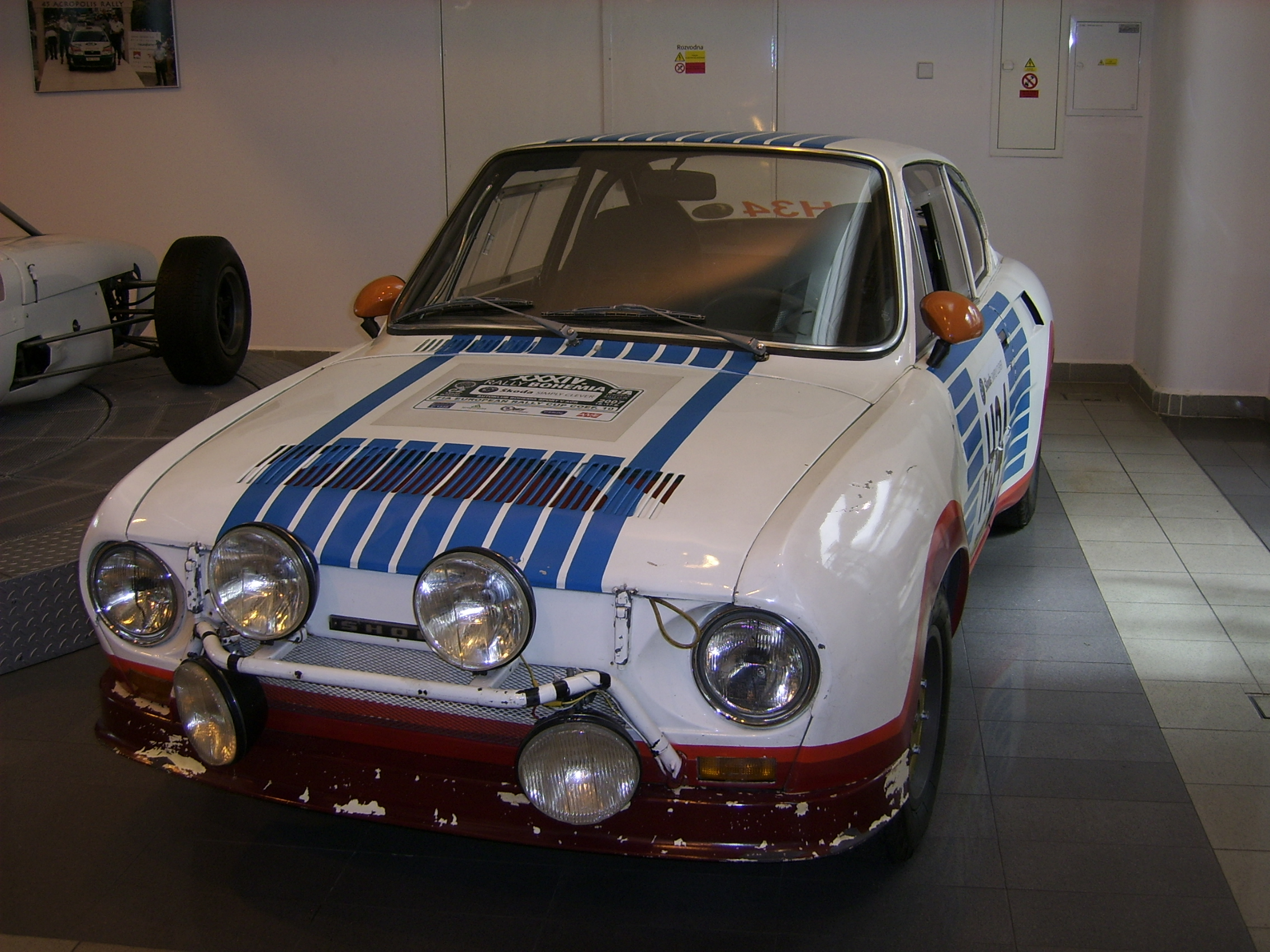 Škoda 130 RS Sport im Škoda-Museum